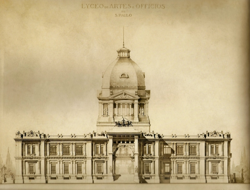 Projeto da fachada do edifício do Liceu de Artes e Ofícios (atual Pinacoteca do Estado), realizado pelo escritório técnico de Ramos de Azevedo e executado por Domiciano Rossi, c. 1897. - Acervo do Liceu de Artes e Ofícios de São Paulo.